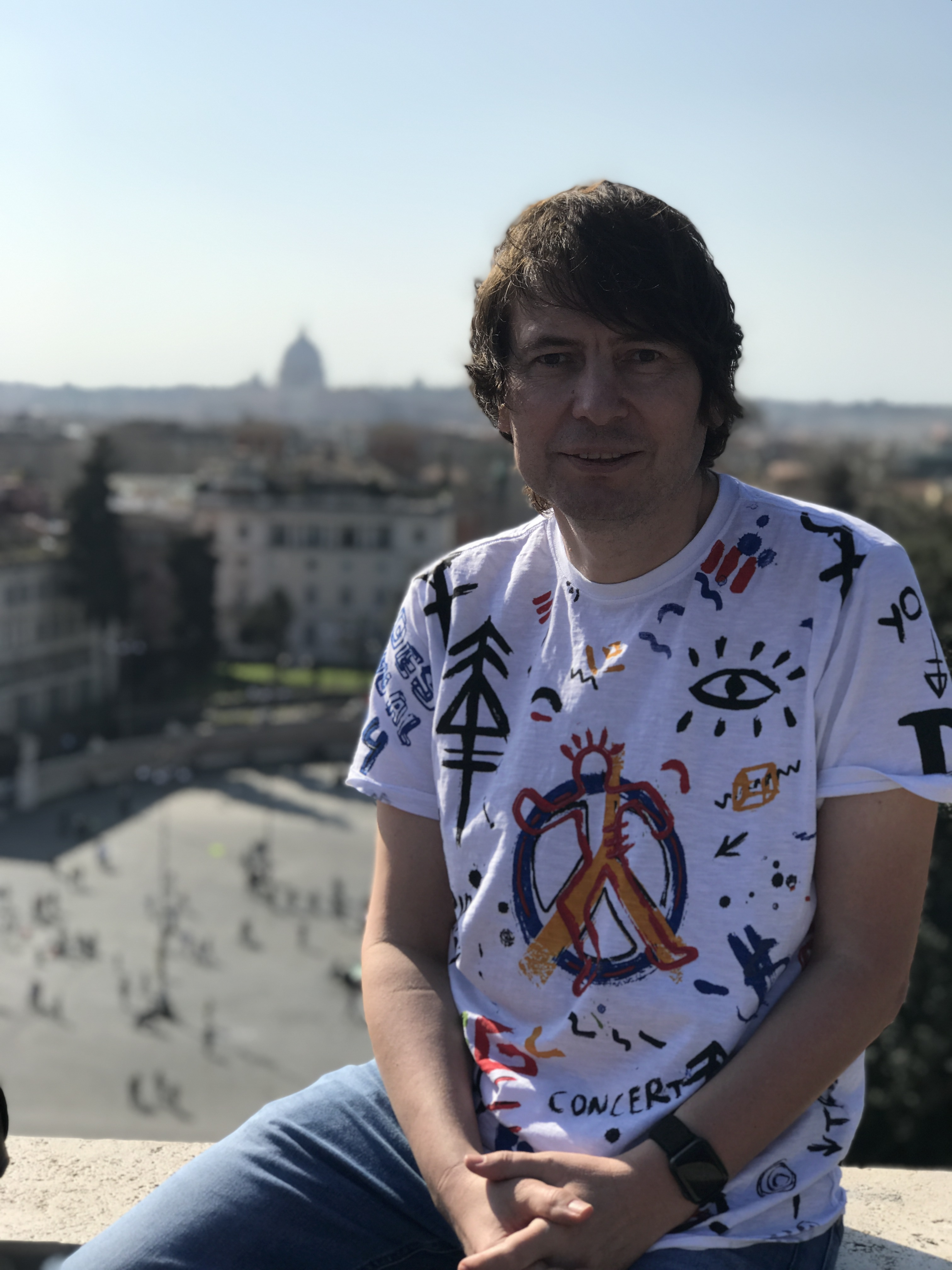 Lelkes Gábor - szlovákiai magyar közgazdász, regionális fejlesztési szakértő